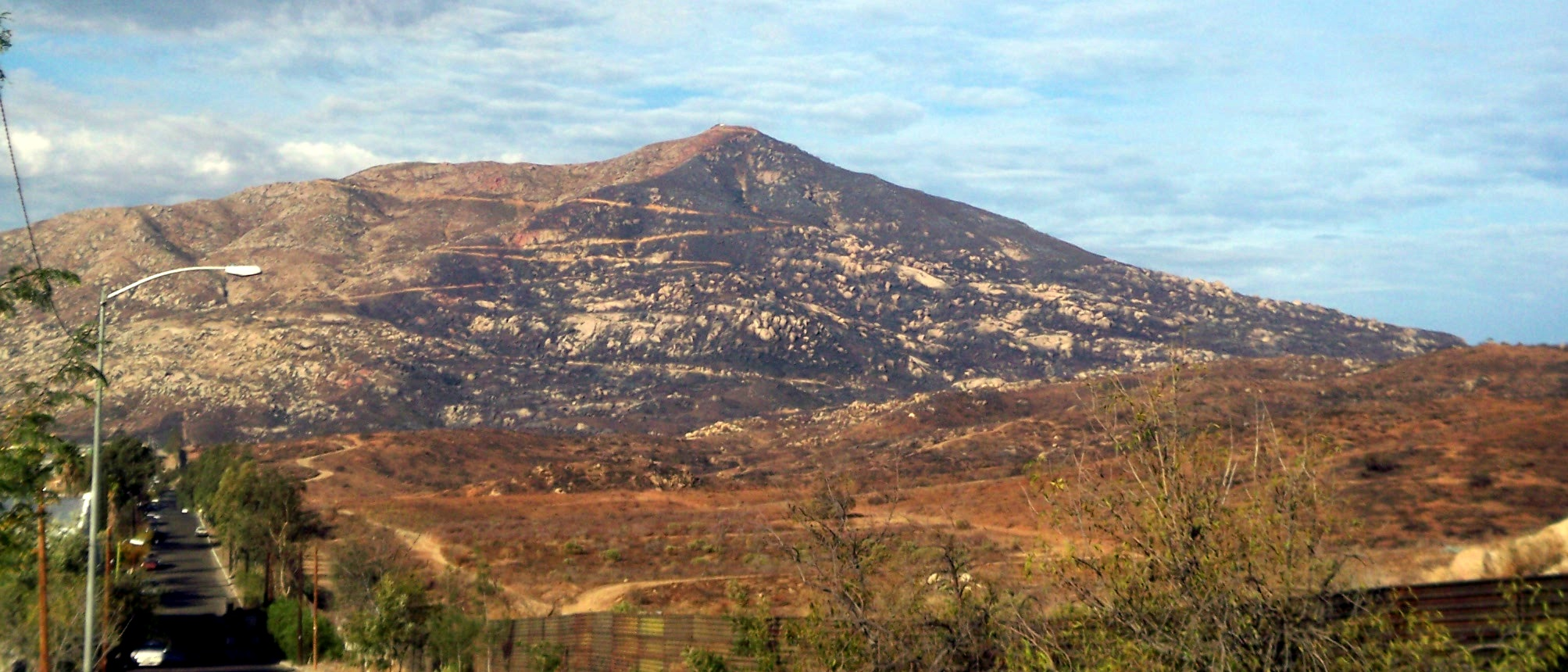 Aunque sigue oliendo a humo.